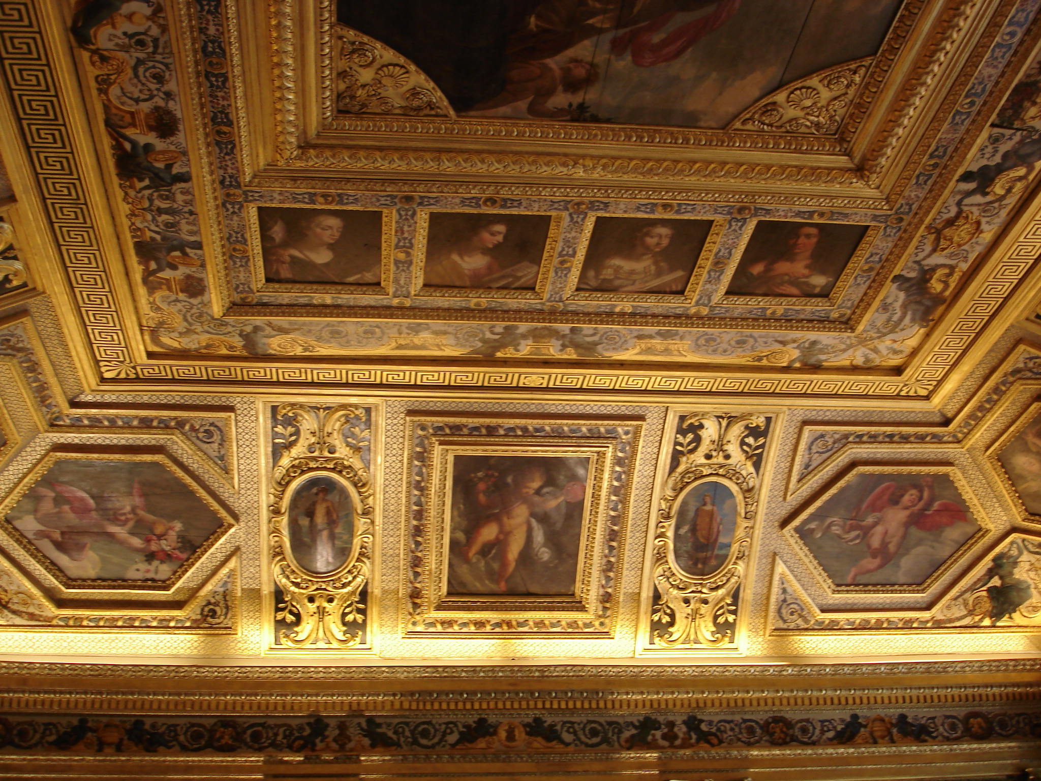 Ceiling of the "Salle du Livre d'Or" (Palais du Luxembourg (Paris V)